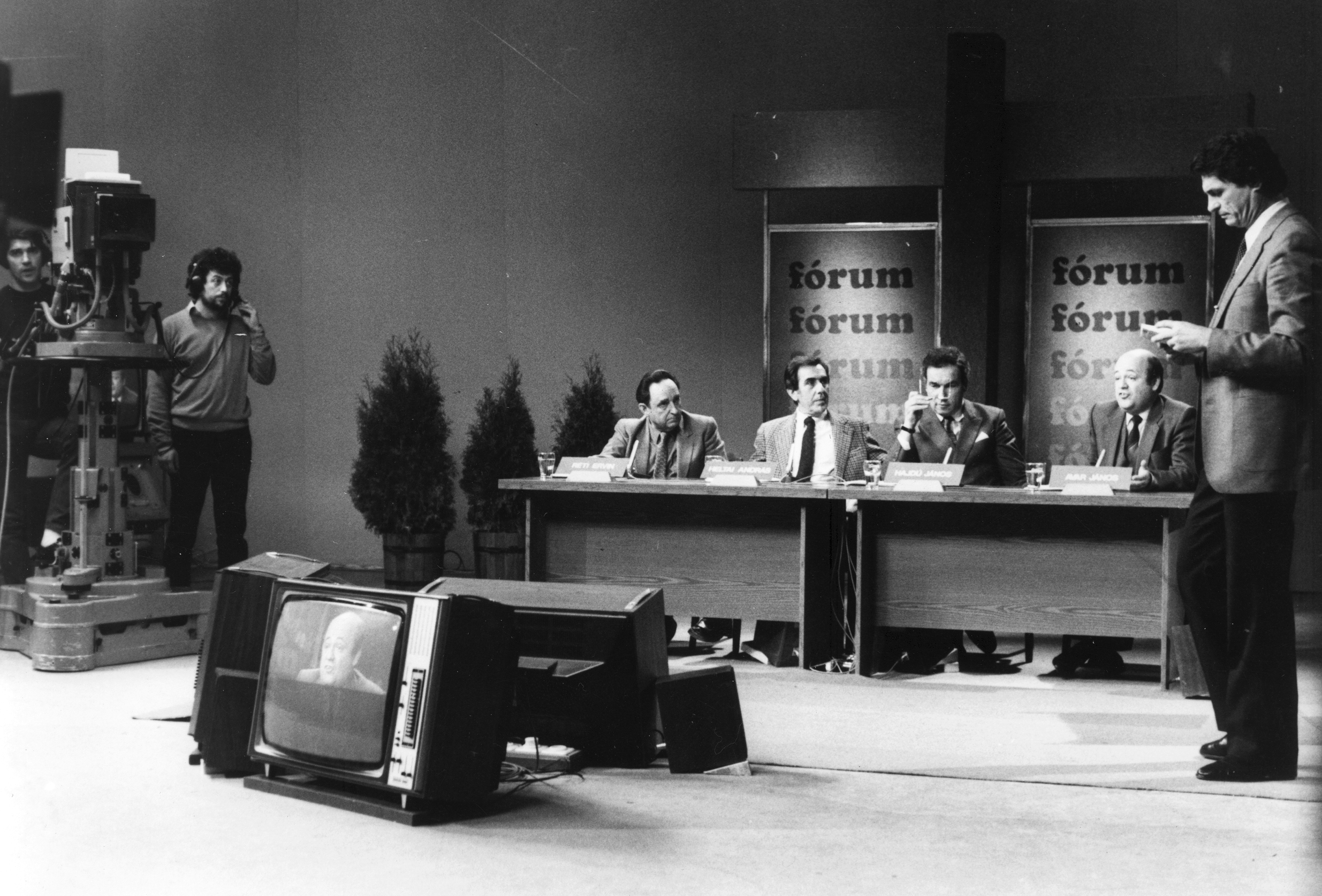 az MTV Fórum c. politikai műsora, jobbra a műsorvezető, Chrudinák Alajos, az asztalnál balról jobbra Réti Ervin, Heltai András, Hajdú János, Avar János újságírók. Location: Hungary, Budapest V. Tags: Hungarian TV, Budapest, television camera, cameraman, sound recording, screen Title: az MTV Fórum c. politikai műsora, jobbra a műsorvezető, Chrudinák Alajos, az asztalnál balról jobbra Réti Ervin, Heltai András, Hajdú János, Avar János újságírók.